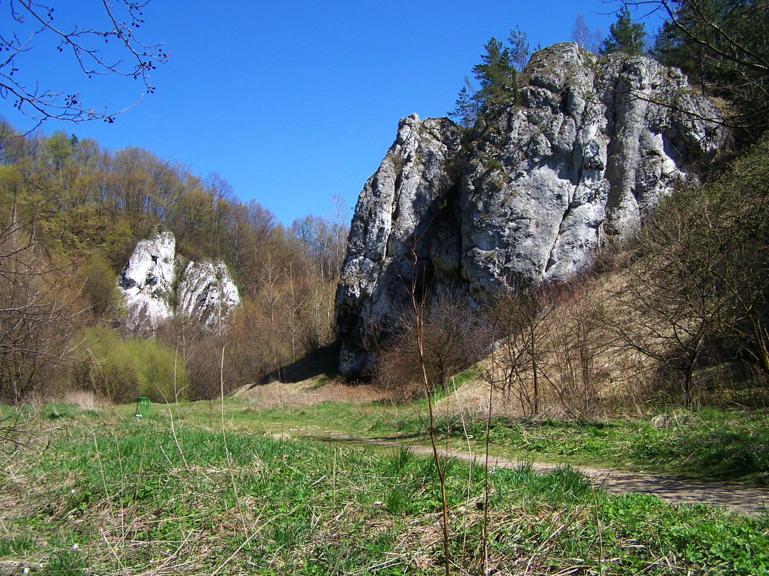 Dolina Kobylańska (Dolinki Krakowskie)